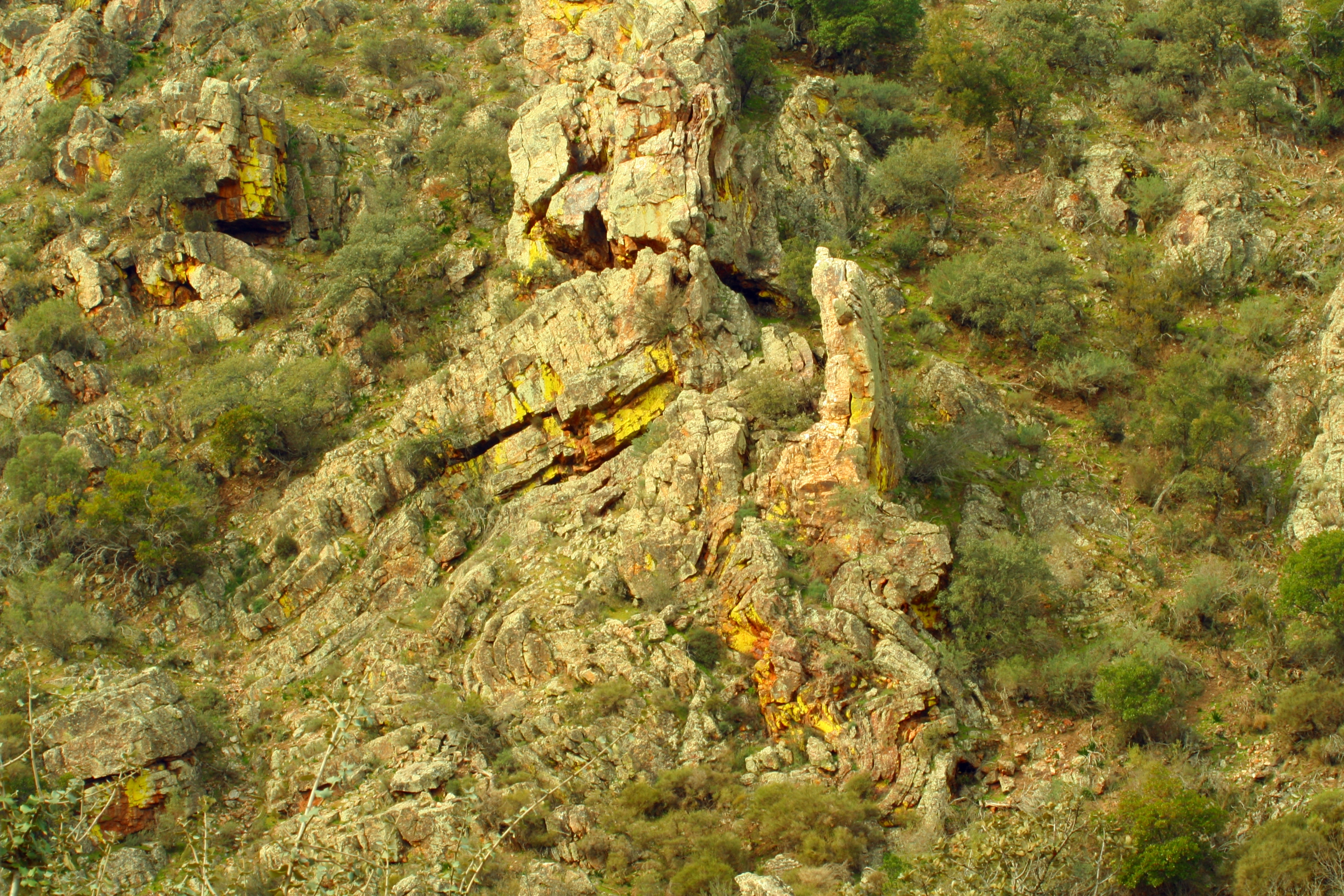 Deformaciones estratigráficas en el Parque Nacional de Monfragüe, Cáceres (Extremadura, España).